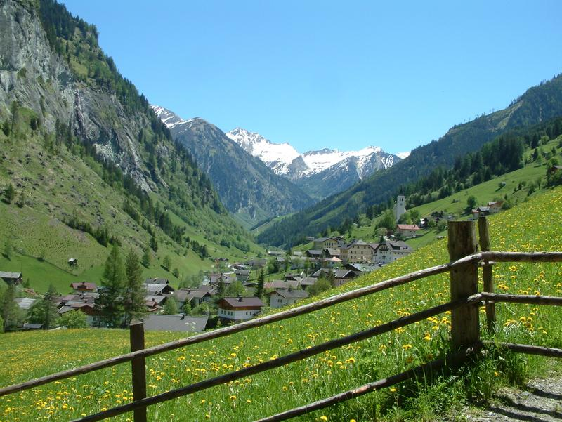 Hüttschlag